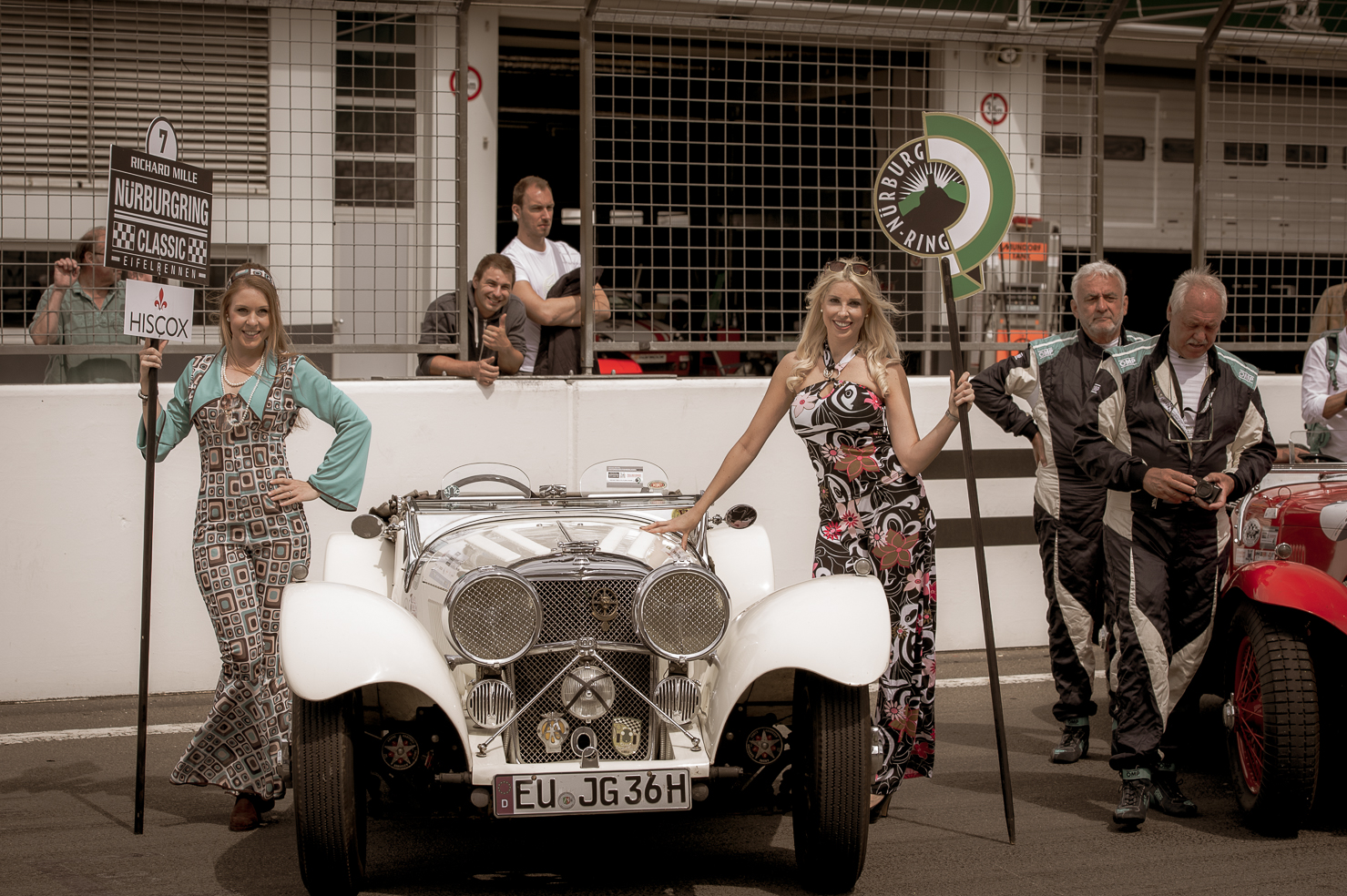 Startaufstellung des Elefantenrennen Im Rahmen der Nürburgring Classic.